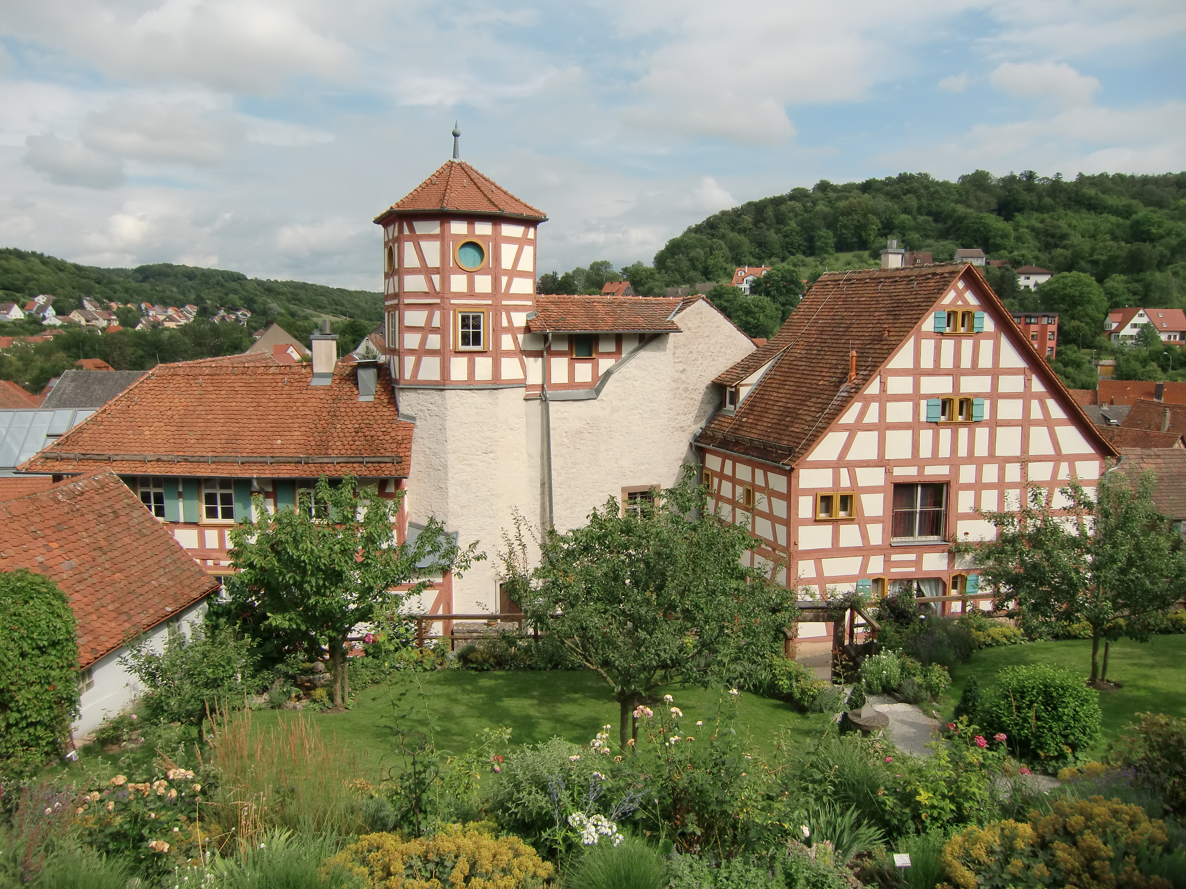 Gebäudekomplex "Romschlössle" in der Tauberstadt Creglingen. Aufgenommen vom dazugehörenden Rosengarten